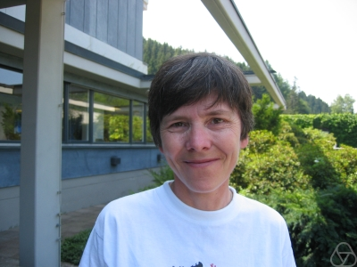 Hélène Esnault 2006 in Oberwolfach